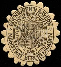 Sealing stamp Title: Koenigreich Bayern Magistrat Berchtesgaden Description: Siegelstempel, schwarz, weiß Place: Berchtesgaden size: 4x4 cm